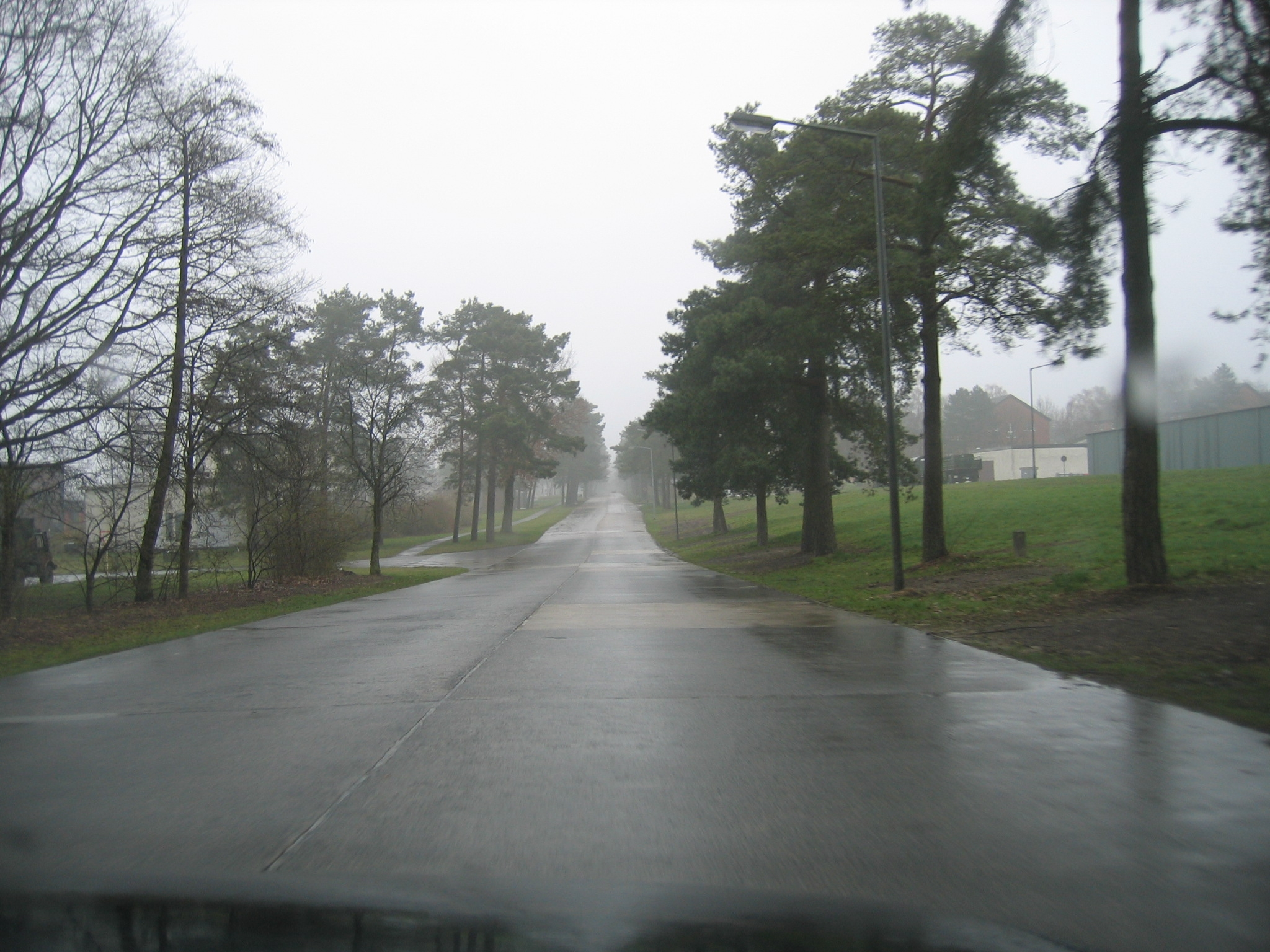 Paradestraße in der Generalfeldmarschall-Rommel-Kaserne